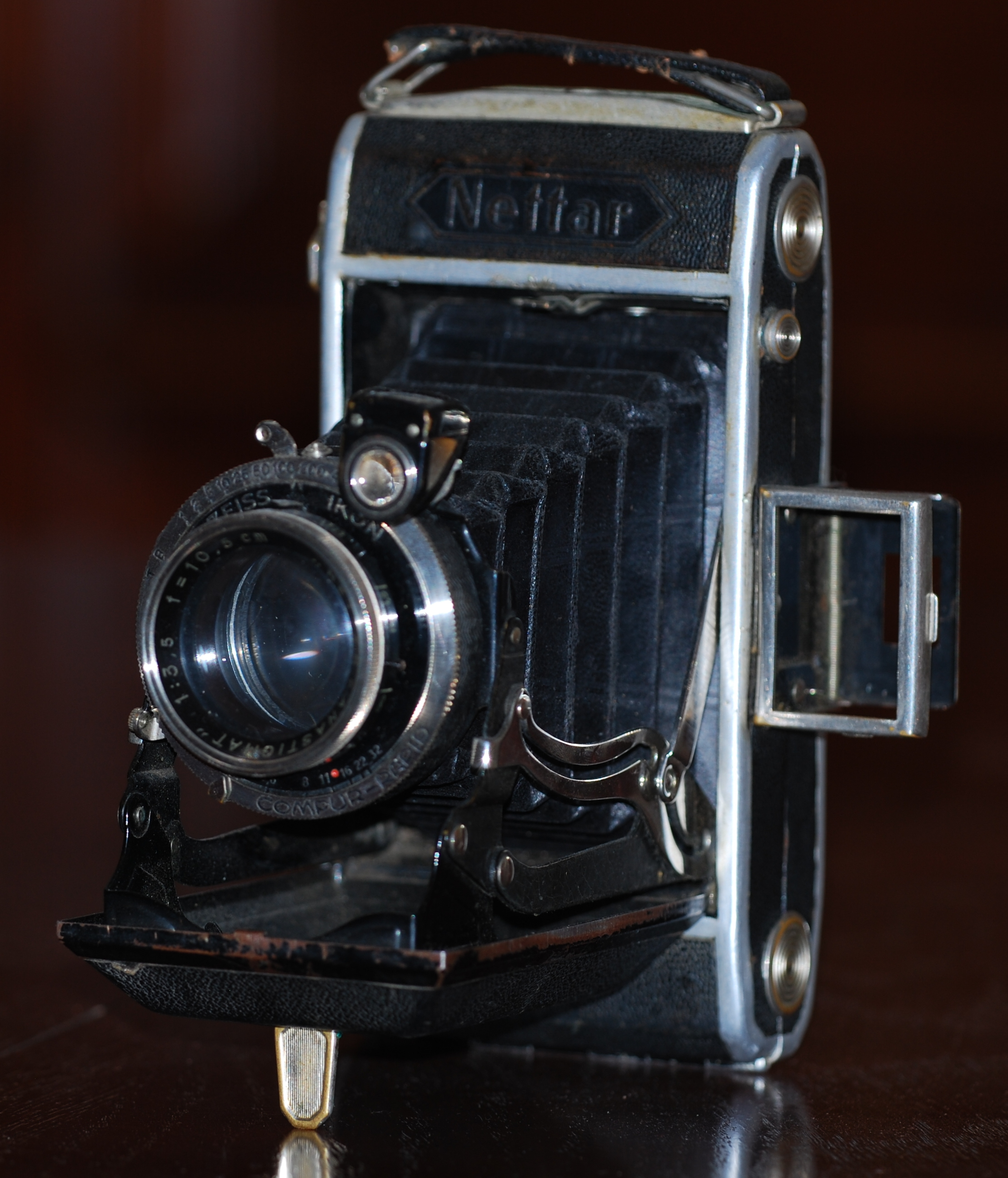 Фотоаппараты Zeiss Ikon